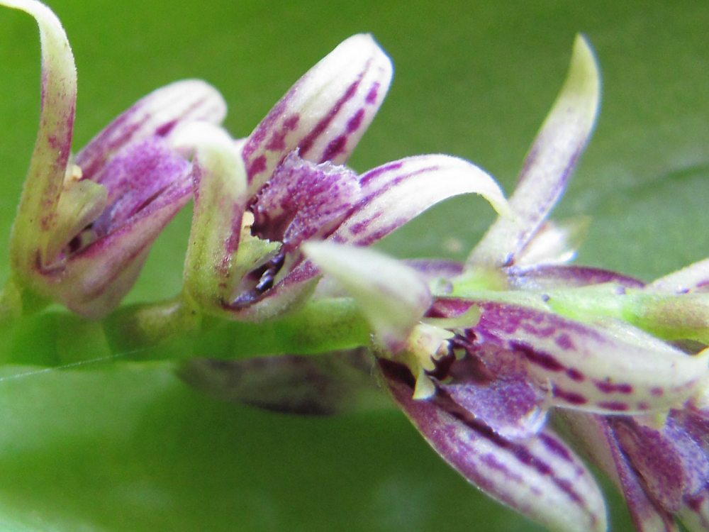 Photos by Americo Docha Neto & Dalton Holland Baptista for Orchidstudium